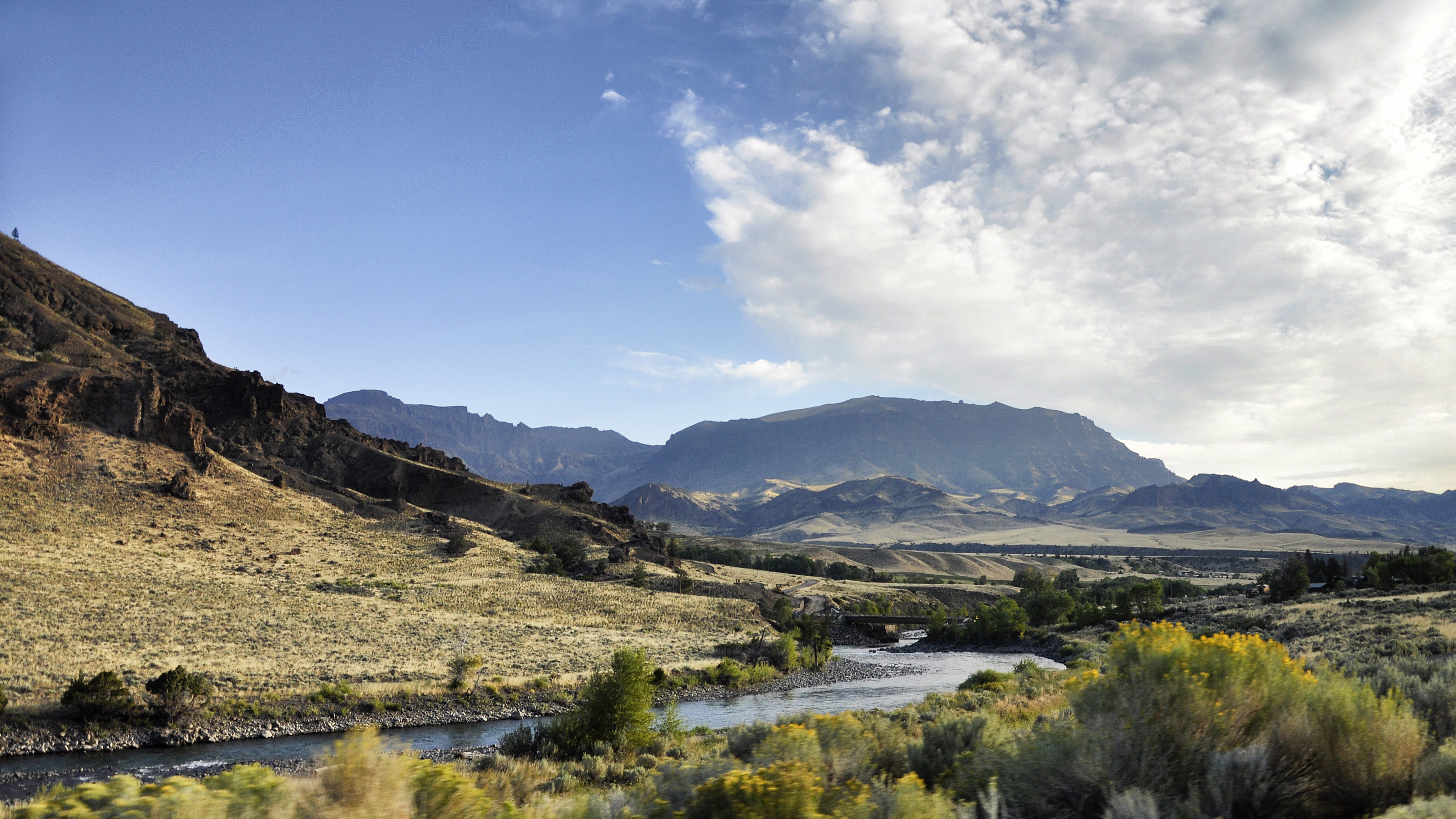 langs de Buffalo Bill Cody Scenic Byway tussen Cody en Yellowstone National Park